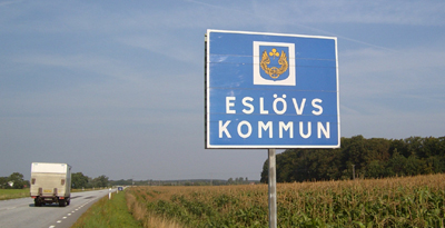 Skylt kommungränsen Eslöv-Höör längs riksväg 17, nära Vännberga.